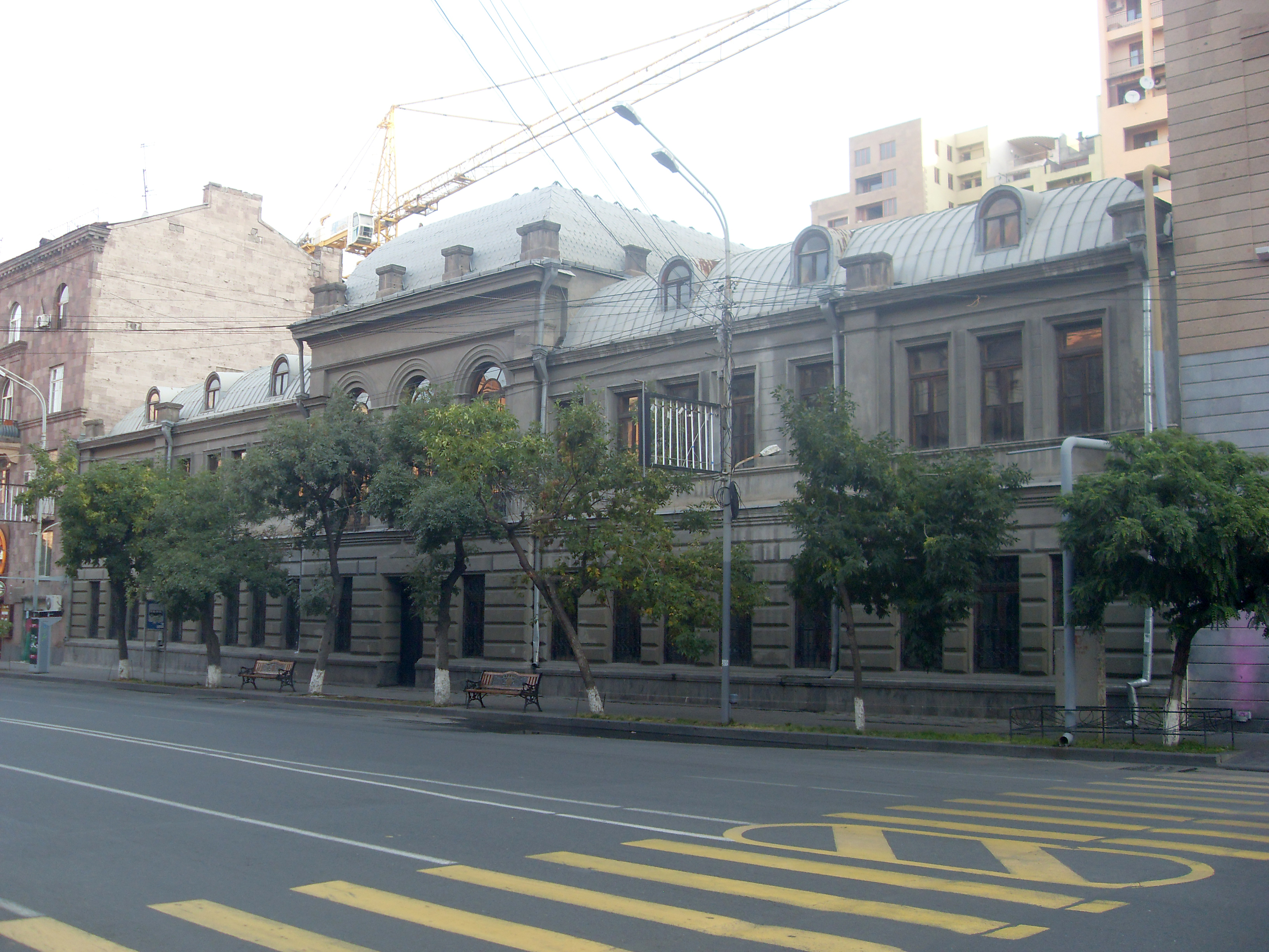 Ուսումնական հաստատության համակառույց. Արական գիմնազիա, 1896 թ., Երևան, Ամիրյան փողոց 6/201